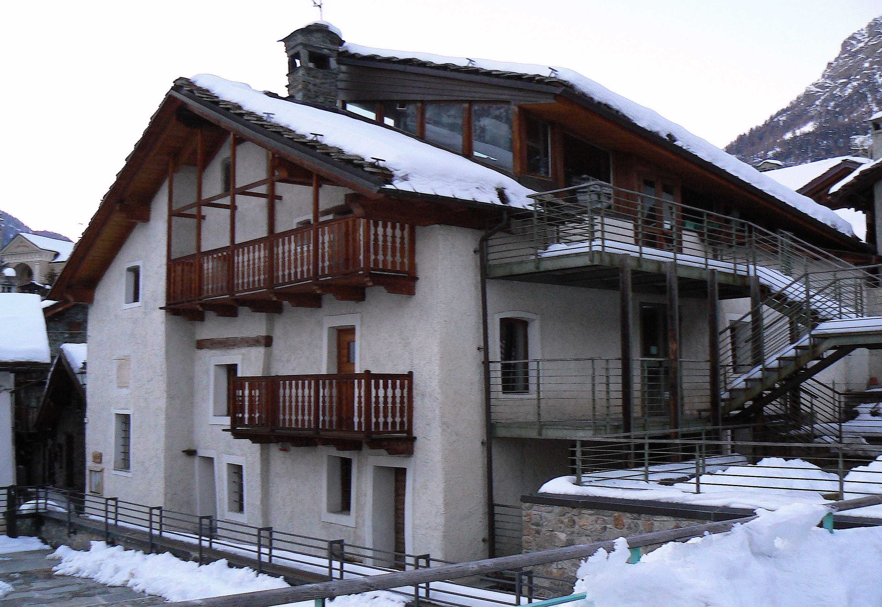 Brusson, Valle d'Aosta, Italia.